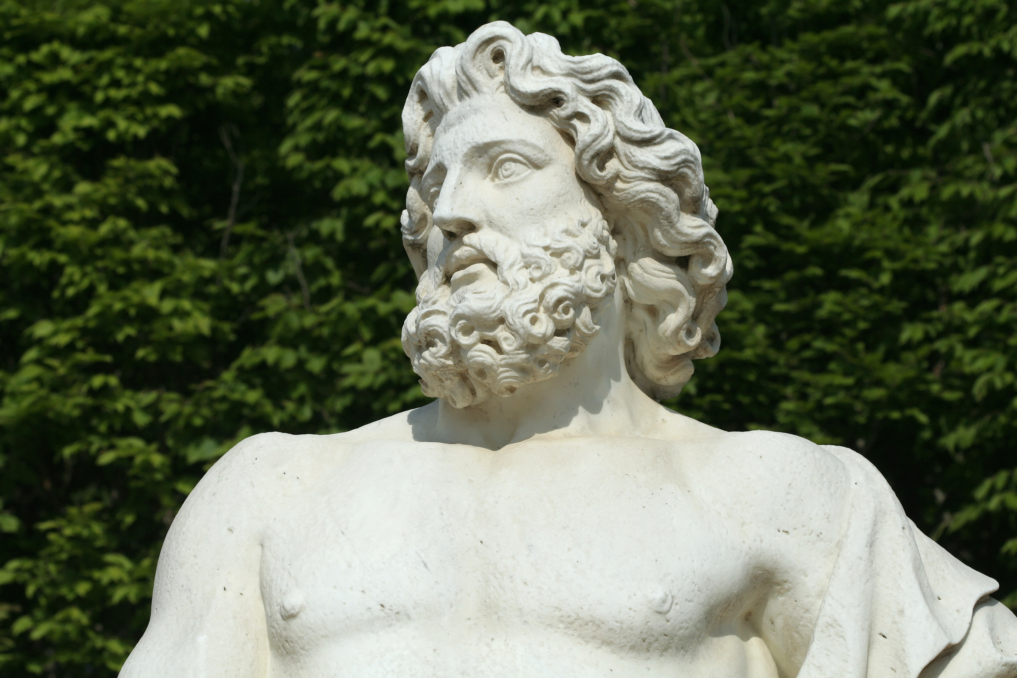 Parc de Versailles, demi-lune du bassin du Char-d'Apollon.Jupiter tenant son foudre, Jean-Jacques Clérion, 1686-1687, h. 2.7 m, marbre. inv1850n°9152